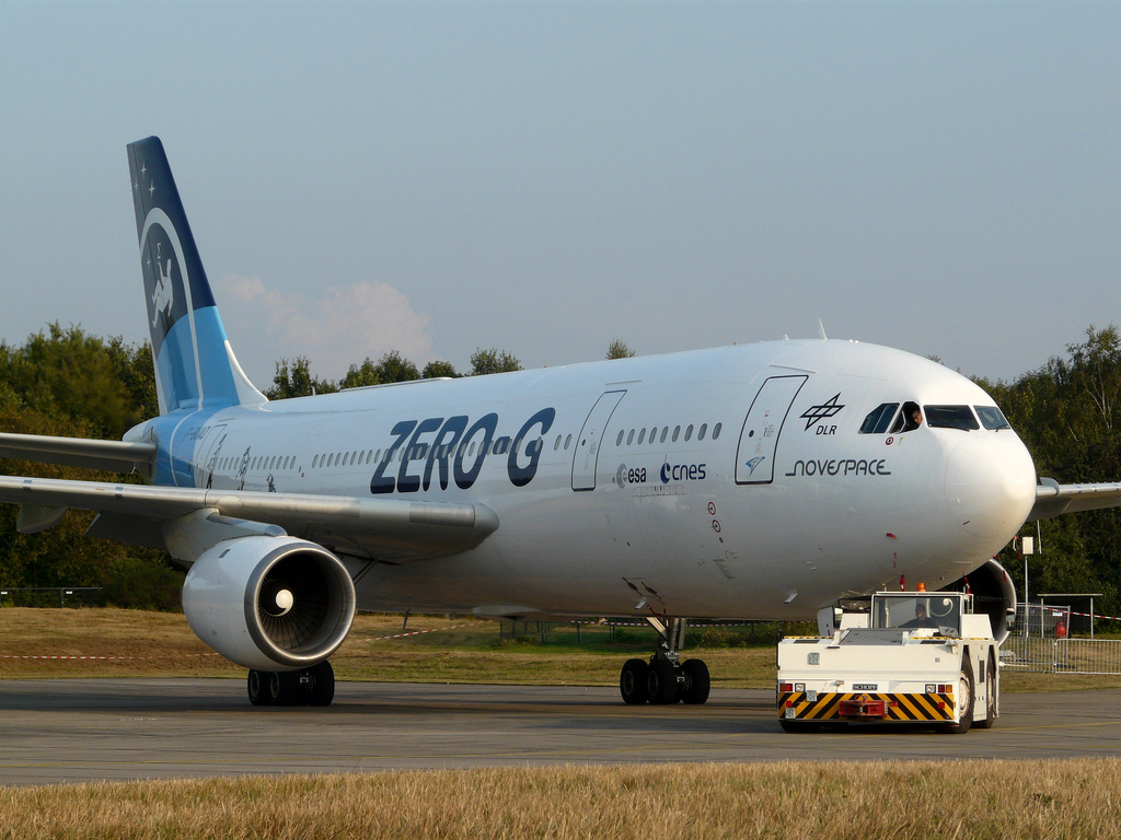 Forschungsflugzeug Airbus A-300 ZERO-G für Parabelflüge zur Schwerelosigkeitssimulation.